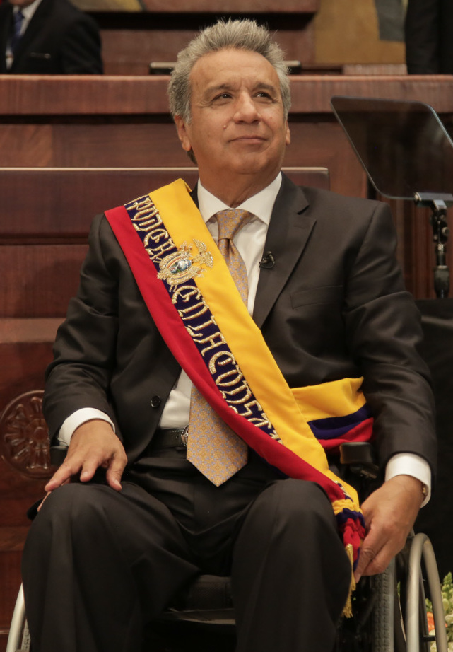 Tema: Transmisión del Mando Presidencial Ecuador 2017. Fotografía: Alberto Romo/Asamblea Nacional